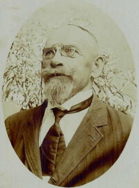 Fran Maselj - Podlimbarski (1852-1917), Slovene writer and officer.